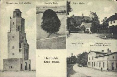 Jasna na pocztówce z początku XX w.